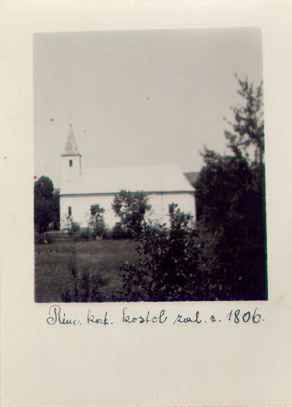 Horný Vadičov - kostol